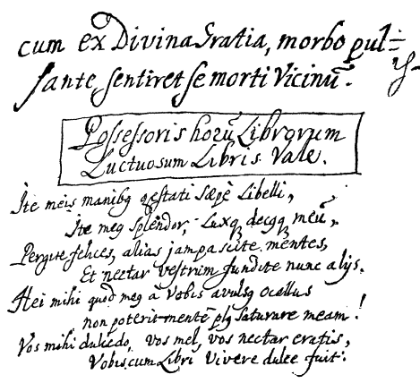 Маслов С. И. Библиотека Стефана Яворского. Киев, 1914.